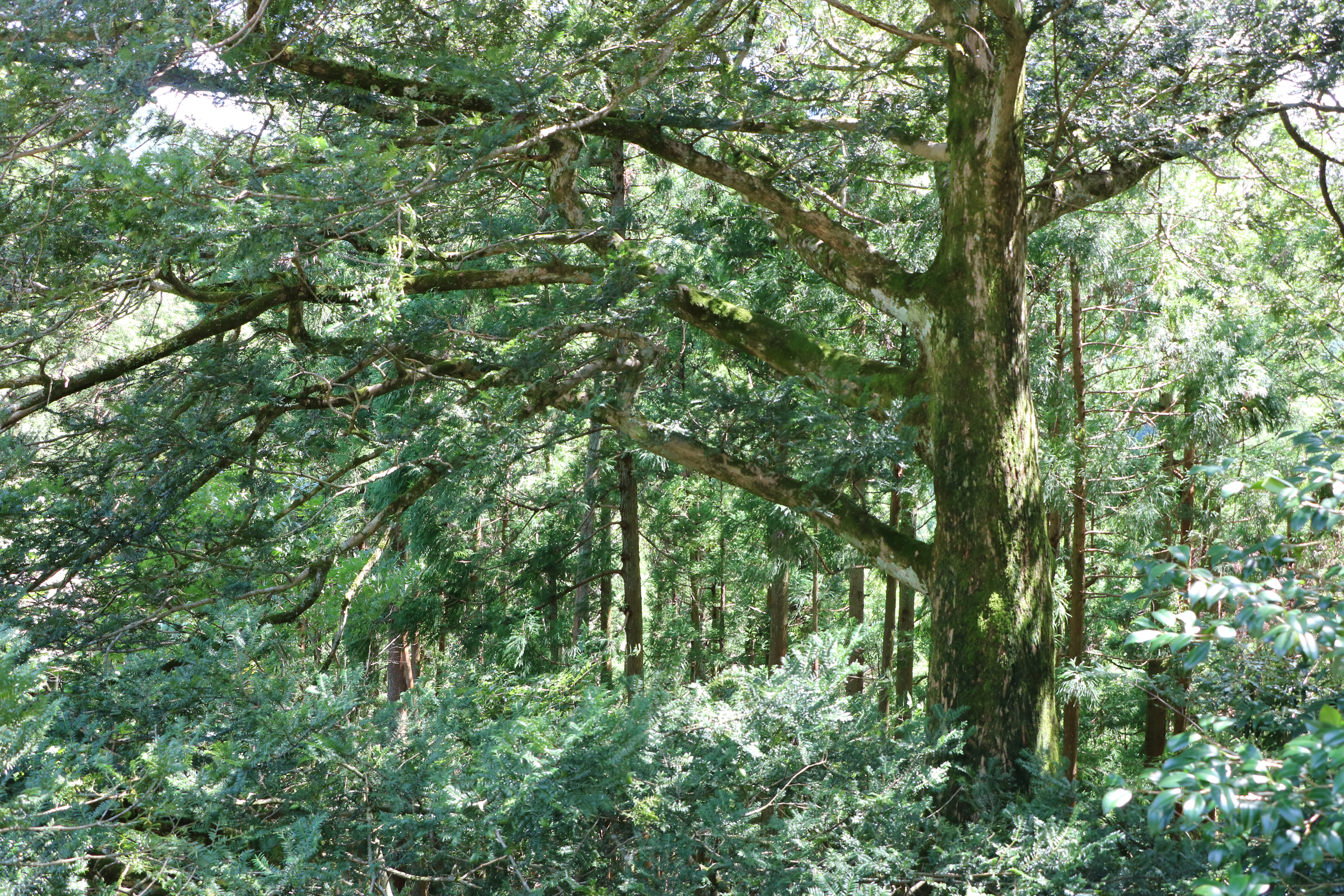 熊野のヒダリマキガヤ（国指定天然記念物）滋賀県蒲生郡日野町。